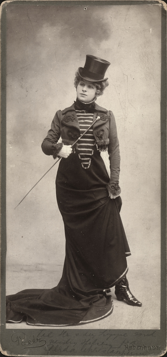 Den danske skuespilleren og sangeren Gerda Christophersen i et rollebilde fra operetten "Winterblut" i 1890. Fotograf: Harald Paetz.